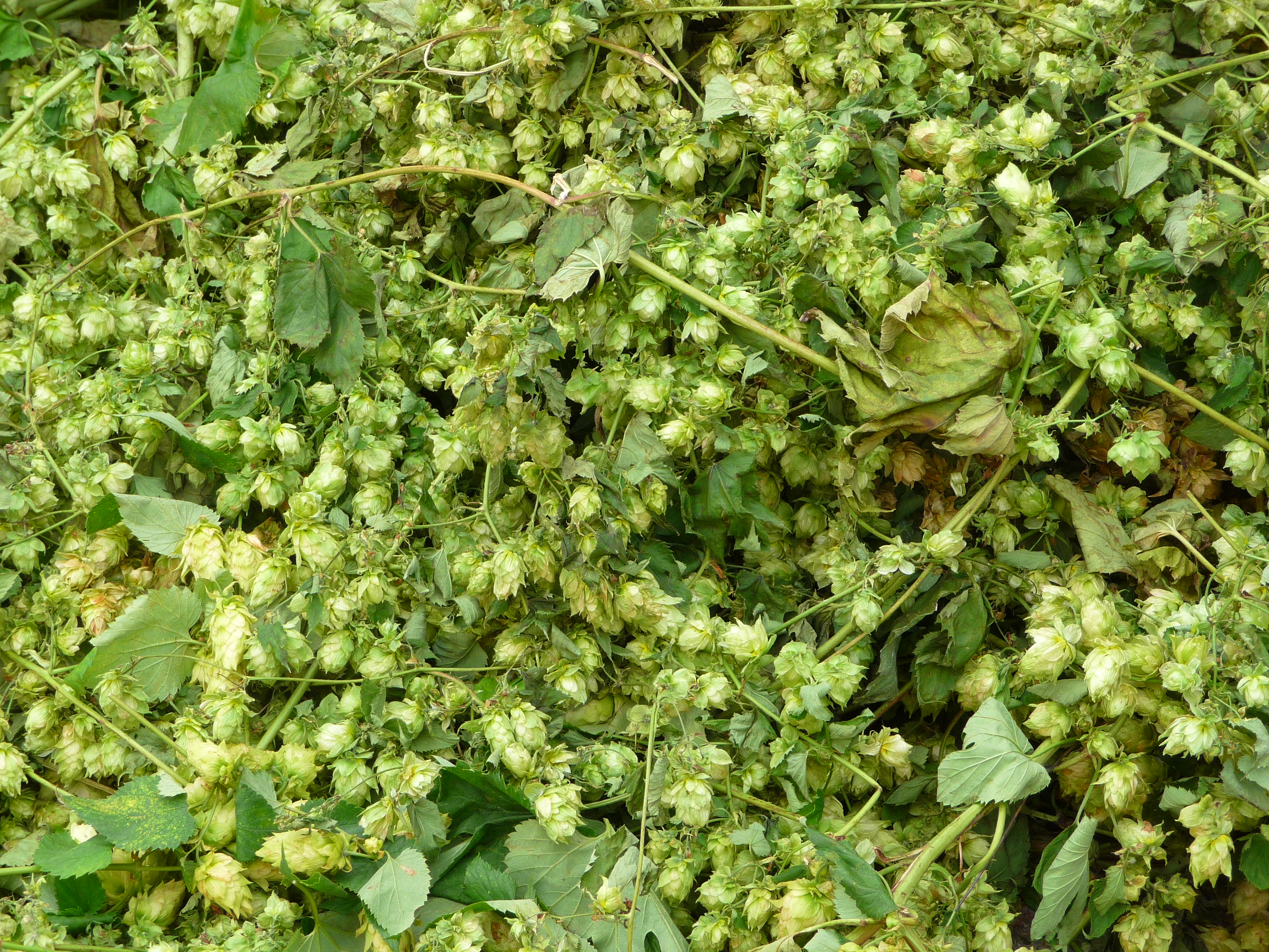 Hopfen geerntet